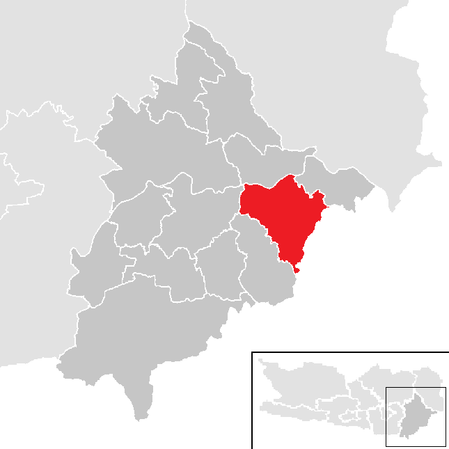 Bezirk Völkermarkt